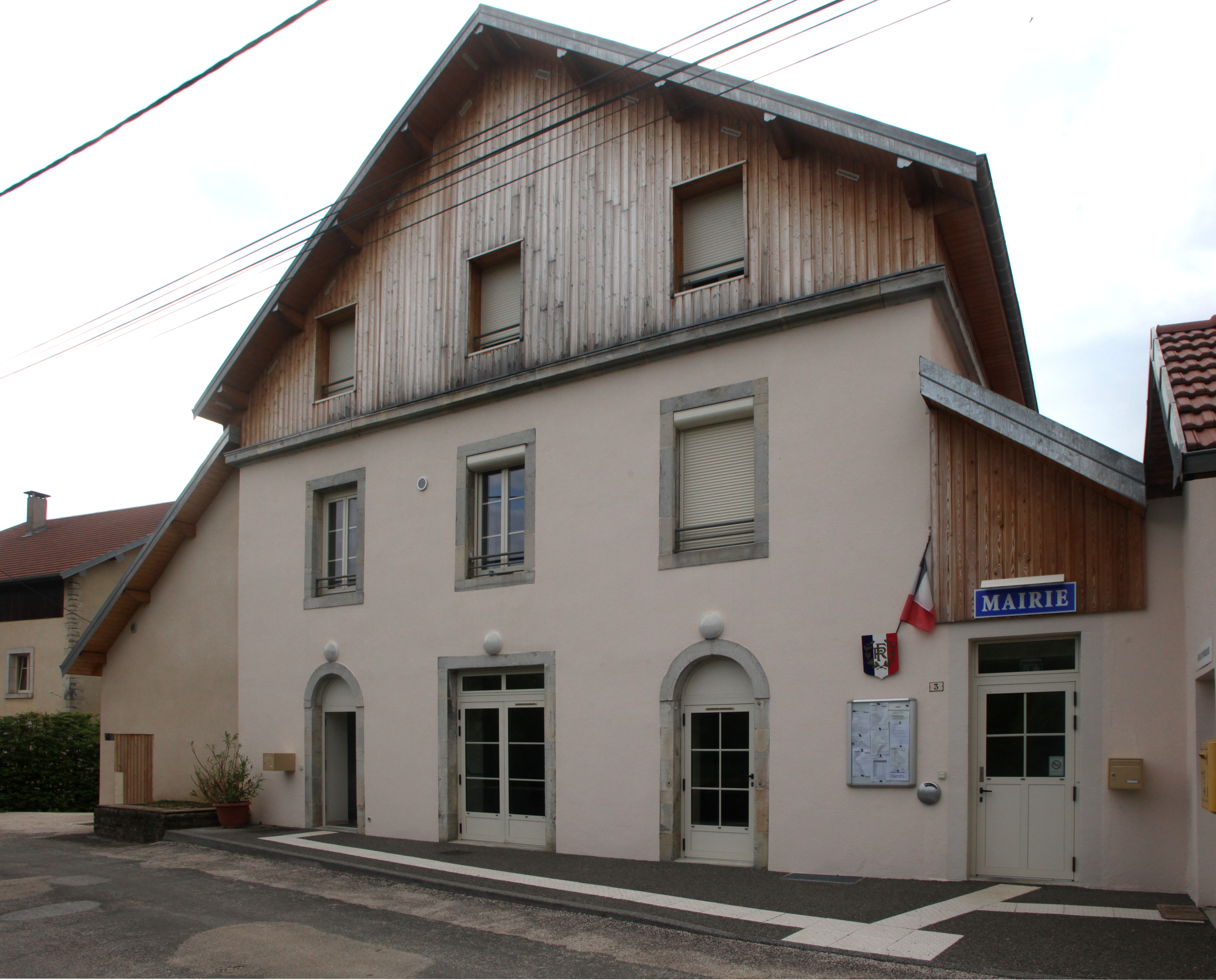 Mairie de Villers-sous-Montrond (Doubs).